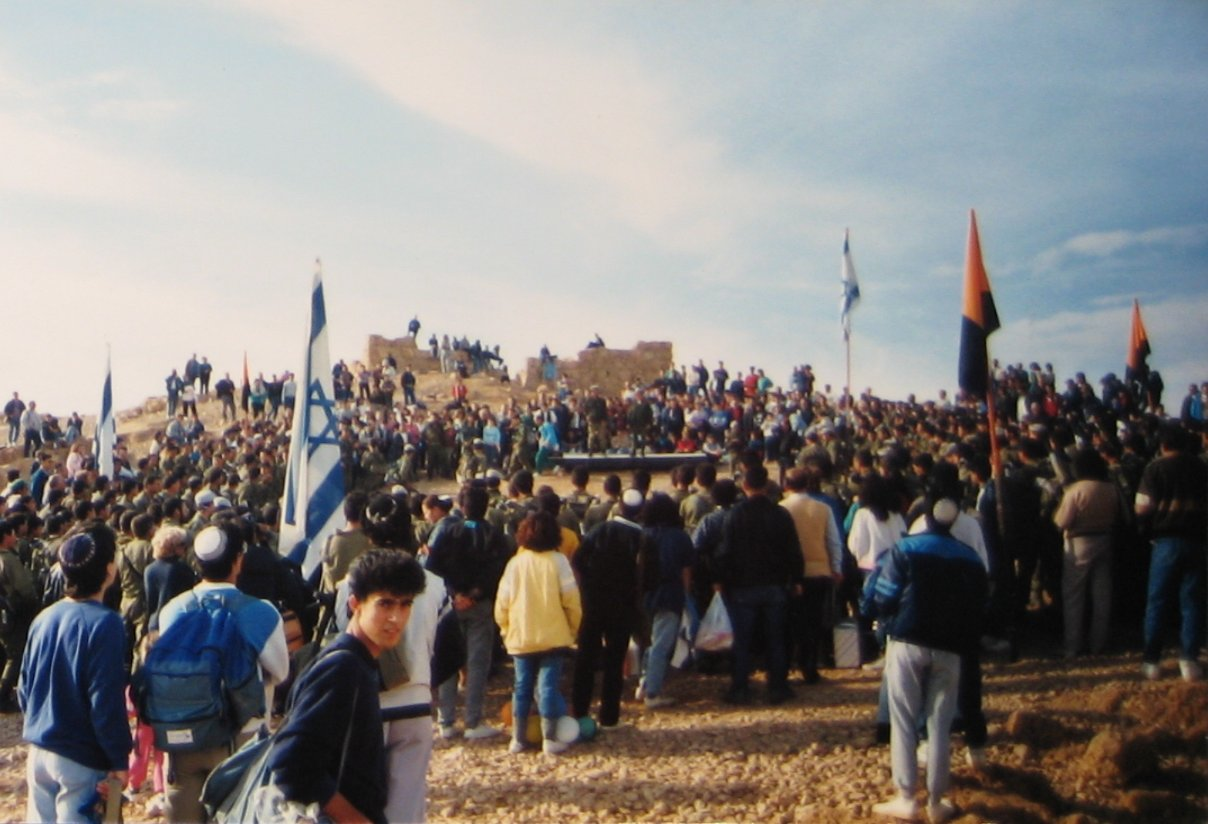 Israelische inalguratie van dienstplichtigen op masada